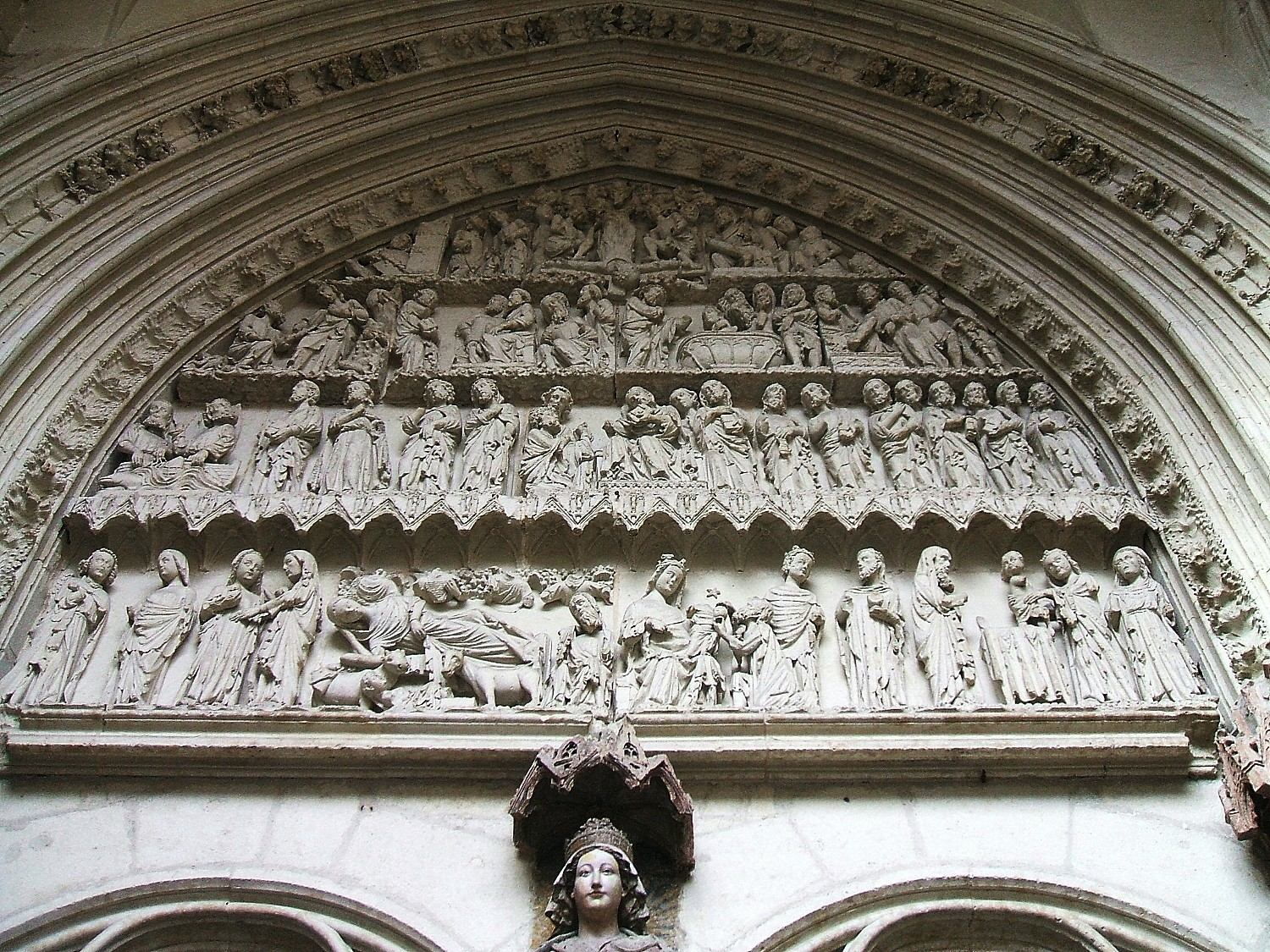 Tímpano del Pórtico Viejo, iglesia de San Pedro Apóstol, Vitoria-Gasteiz (s-XIV)